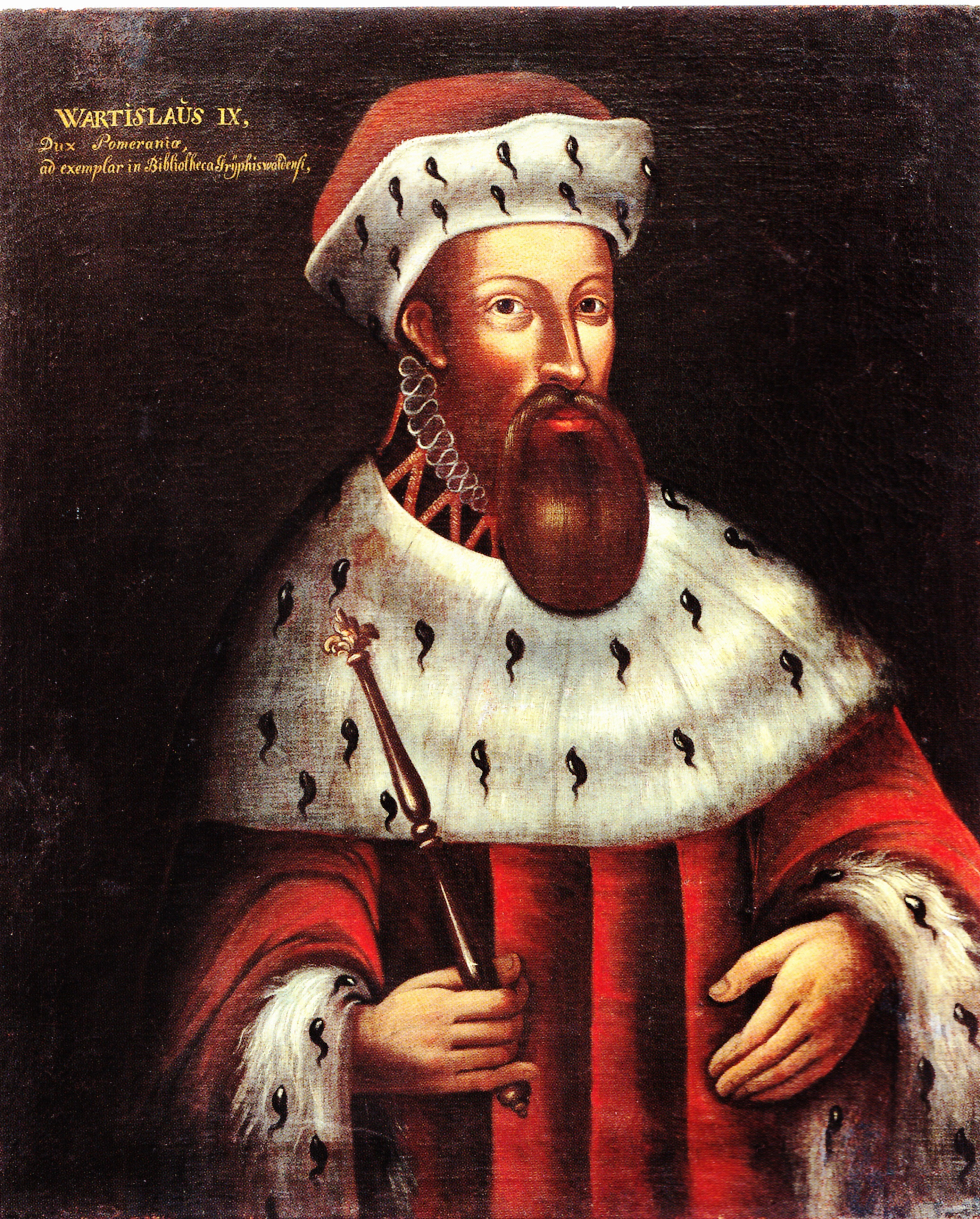 Ölgemälde von Herzog Wartislaw IX. von Pommern, Kopie nach einer Vorlage in der Universitäts-Bibliothek Greifswald